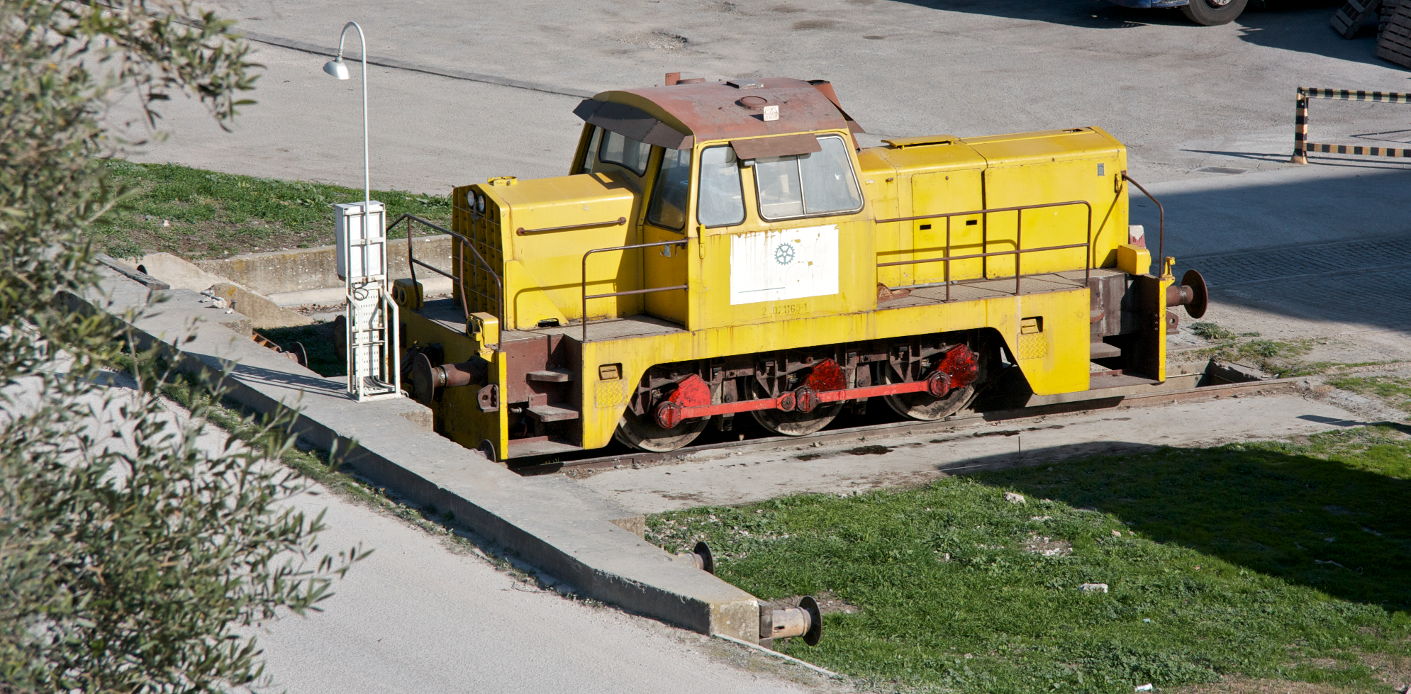 estacionado na Unidade Fabril de Adubos de Alverca (ADP Fertilizantes). Local: Ramal dos Nitratos [Linha do Norte, PK 20] Data e hora: 8 de Janeiro de 2012 [12h48] Material: Locotractor 1160 [Sentinel • Sorefame]